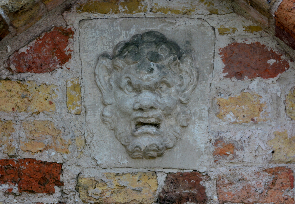 Bears, Marijetsjerke, stien boppe portaal